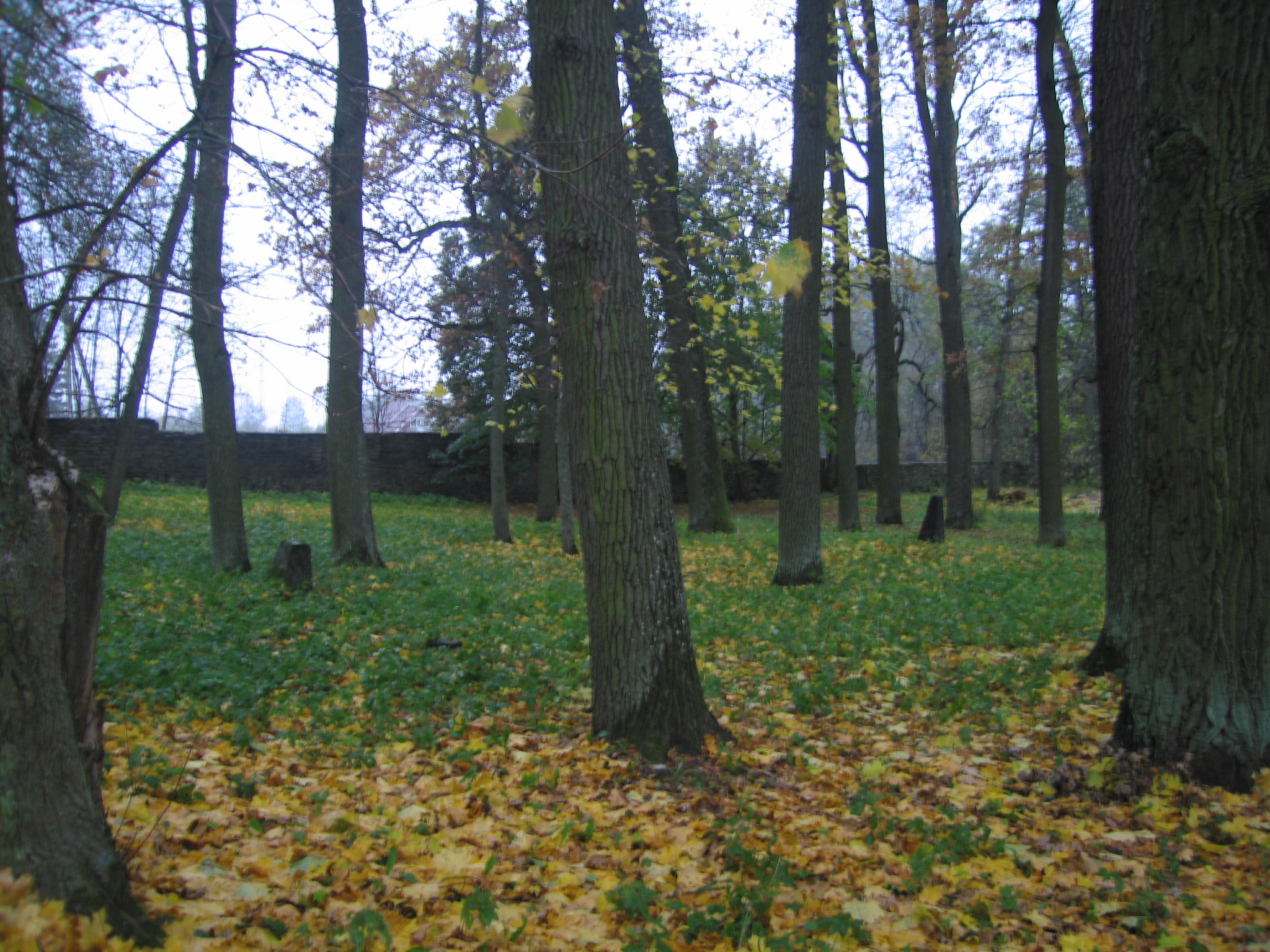 Vaade hauatähistele Maardu mõisa kalmistul